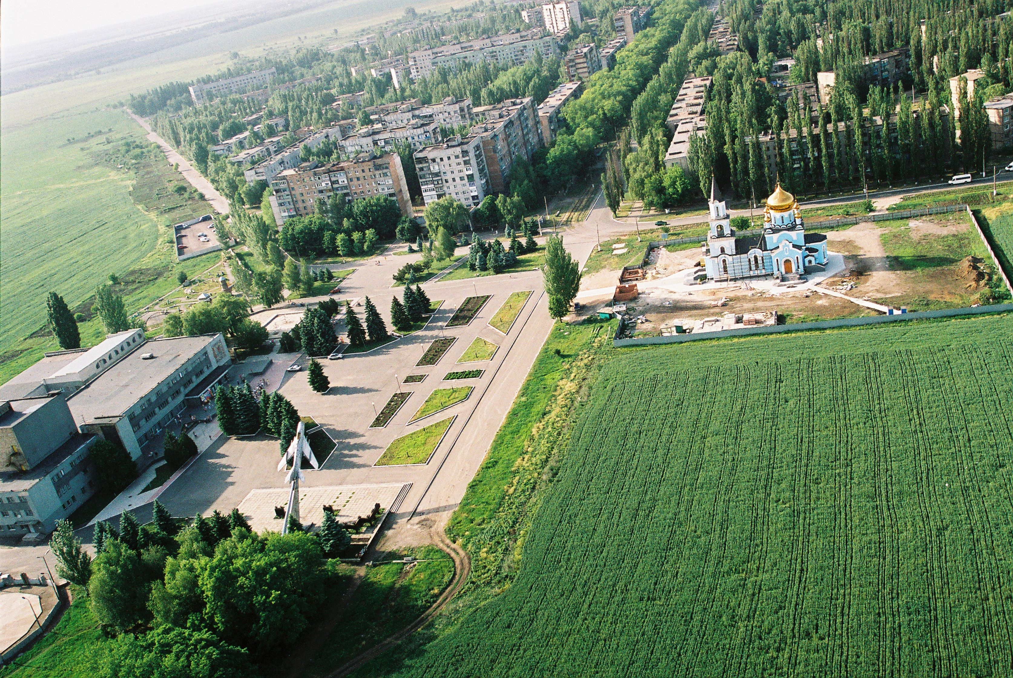 Фото Анастасии Федоренко